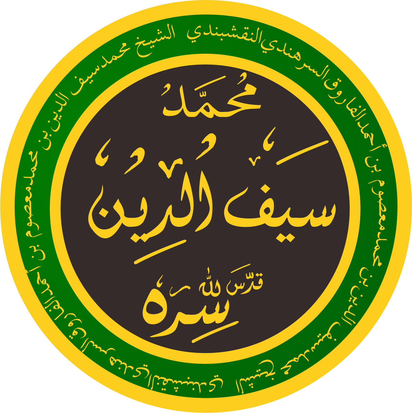 Sayfuddin naqsyabandiyah